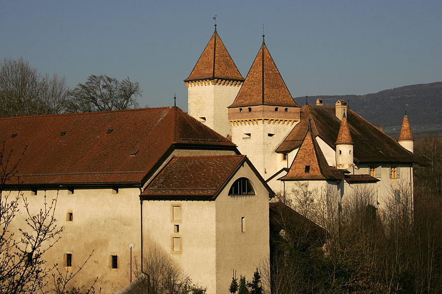 Schloss in La Sarraz